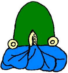 Glifo de Singuilucan, Hidalgo